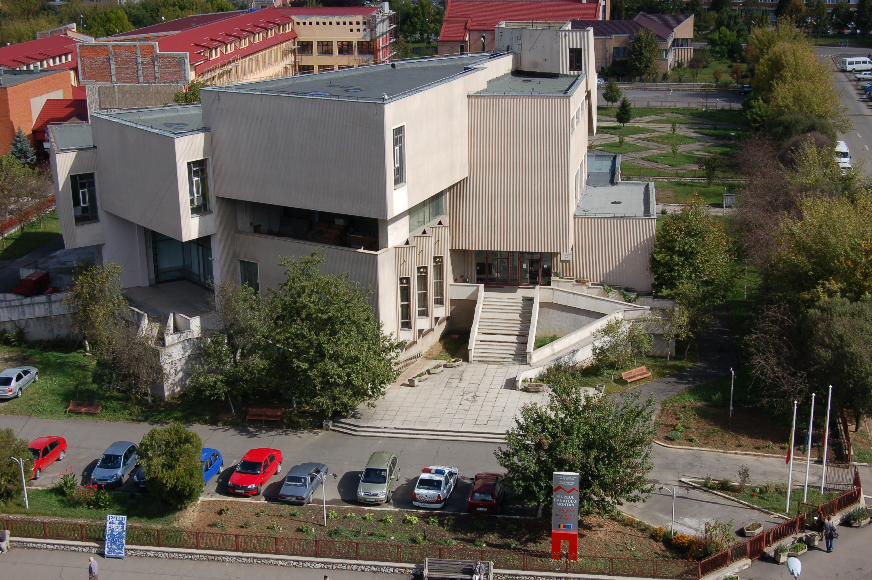 Sediul Muzeului Banatului Montan din Reșița